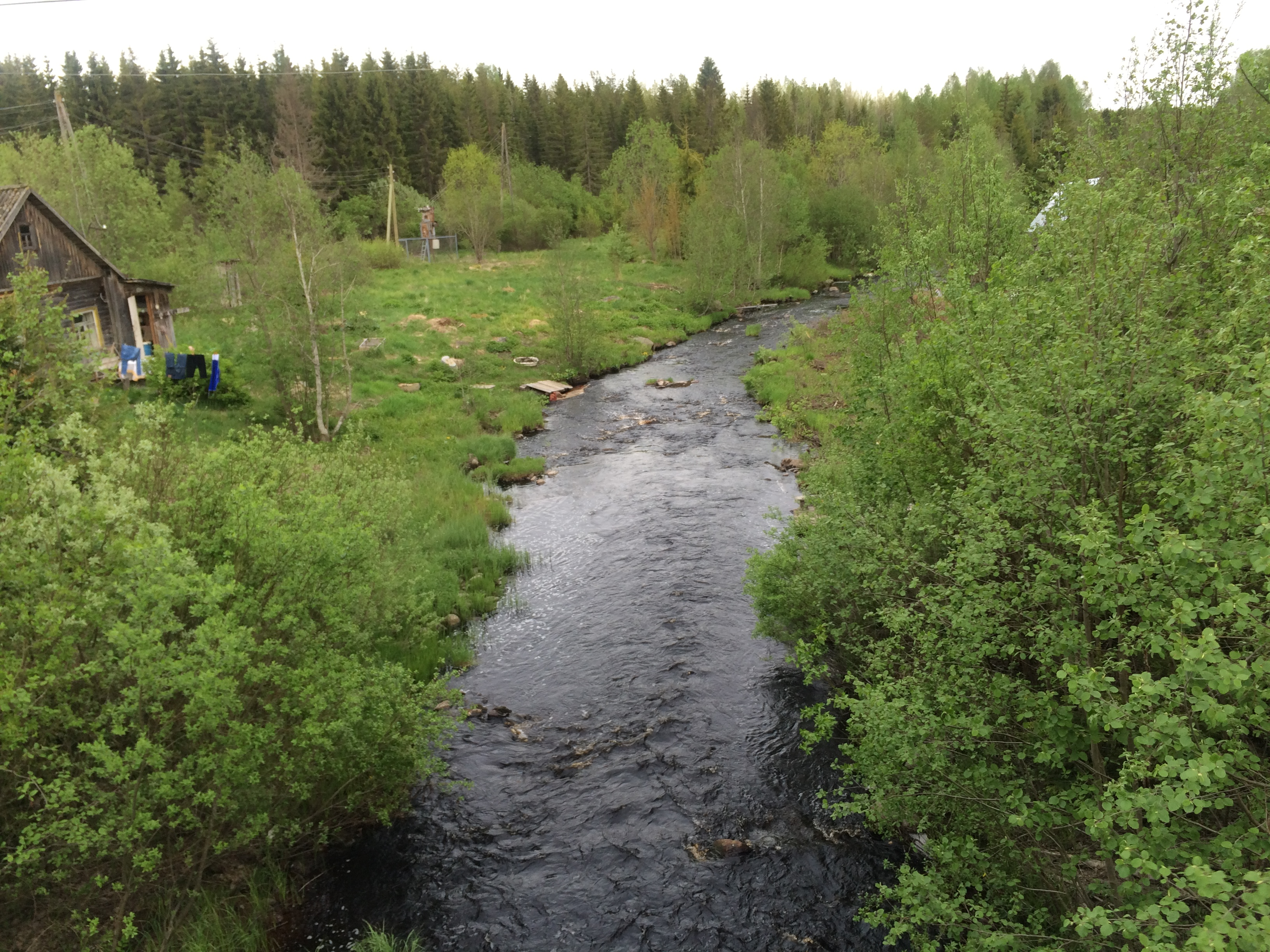 р. Кутижма